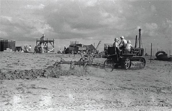 "סעד" - נגב - בבוקר העליה על אדמת "סעד" נקודת התישבות של הפועל המזרחי